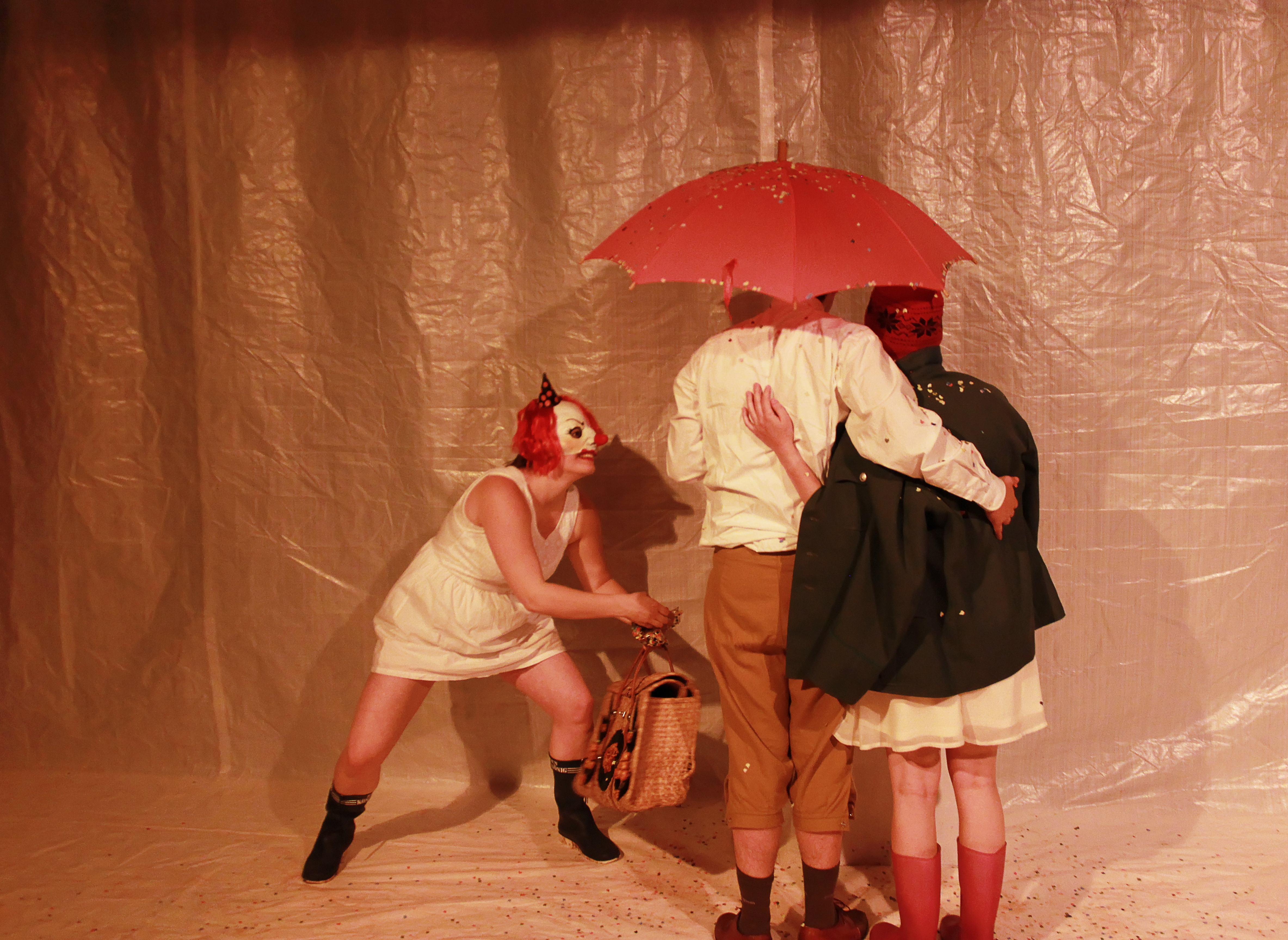 Szene aus einer Aufführung des Dramas Glaube Liebe Hüffnung von Ödön von Horváth unter der Regie von Sarah Kortmann an der Studiobühne Siegburg (Lehrbühne der Schauspielschule Siegburg) in Siegburg in Nordrhein-Westfalen (Deutschland).